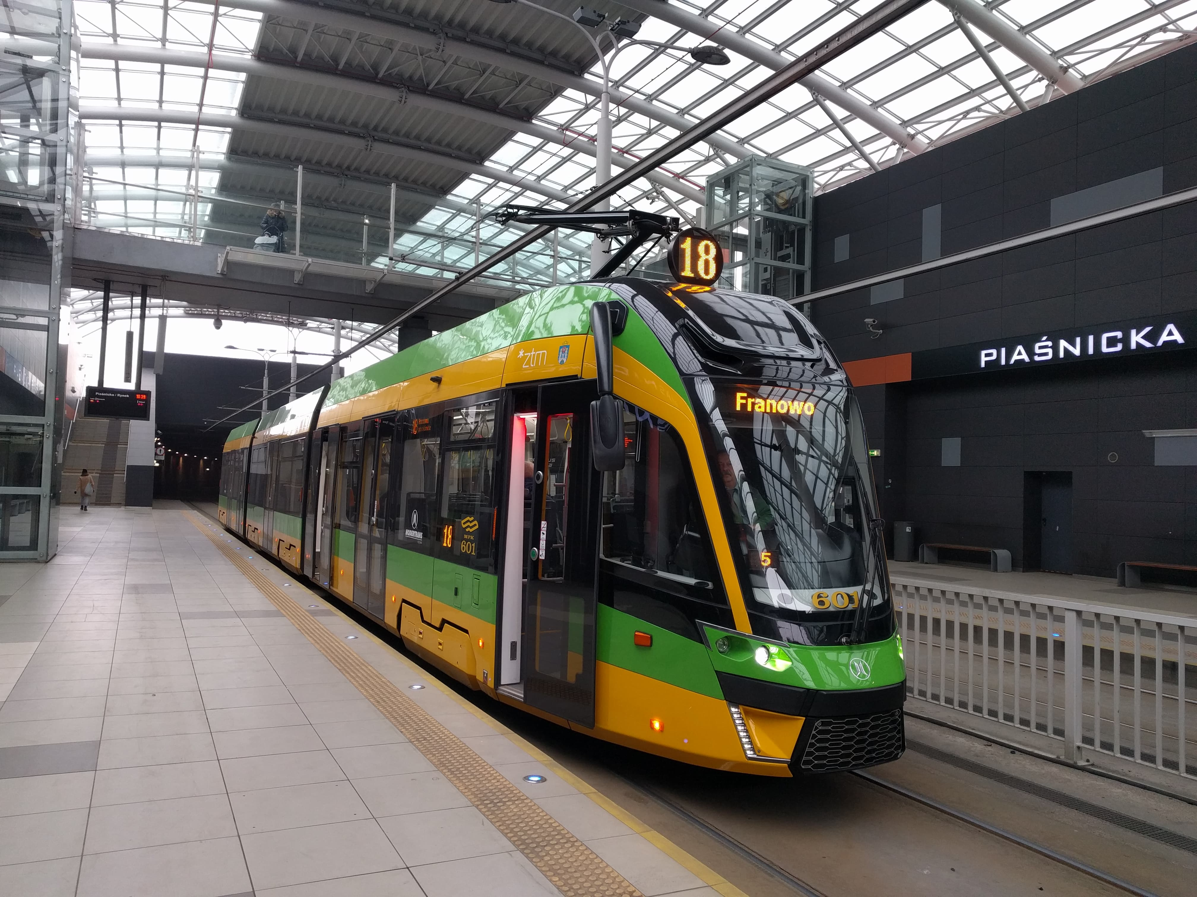 Moderus Gamma #601 na przystanku Piaśnicka/Rynek